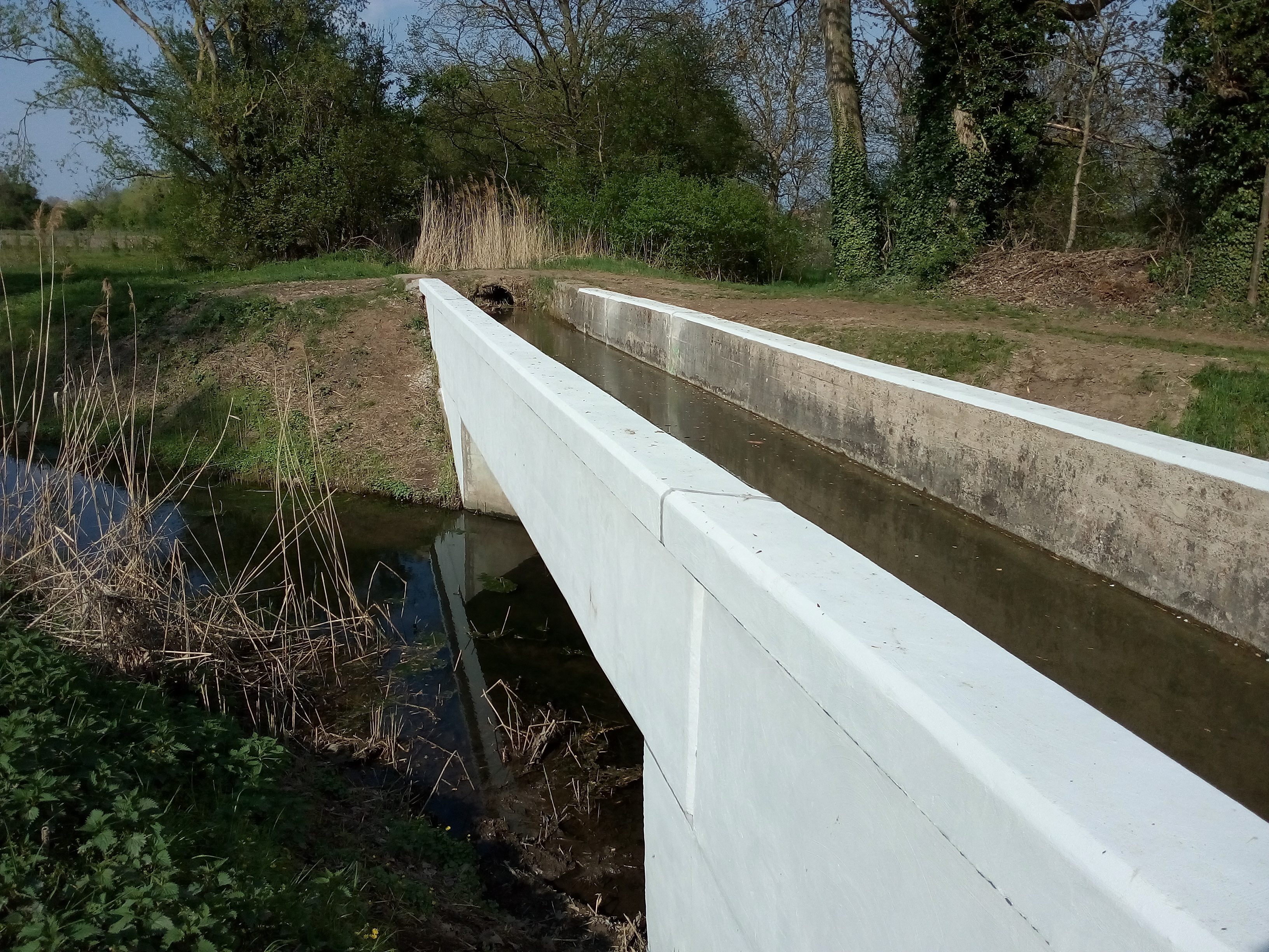 Aquädukt des Weingarter Bachs (örtlicher Name des Walzbachs) über den Neuen Kanal bei Stutensee-Staffort, Landkreis Karlsruhe